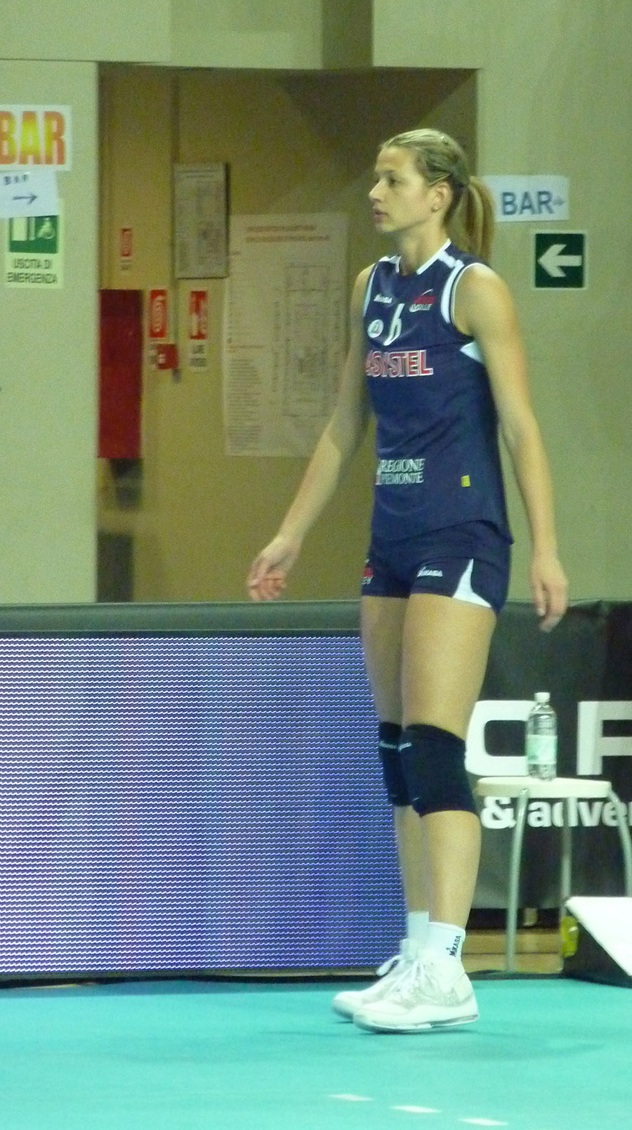 Katarina Barun, pallavolista croata, gioca nel ruolo di schiacciatrice ed opposta.